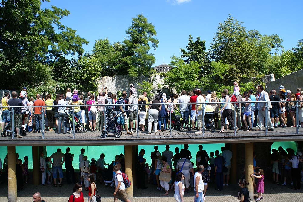 Wrocław Śródmieście, ul. Wróblewskiego 1 - Ogród Zoologiczny: fokarium (zabytek nr A/5263/361/Wm)